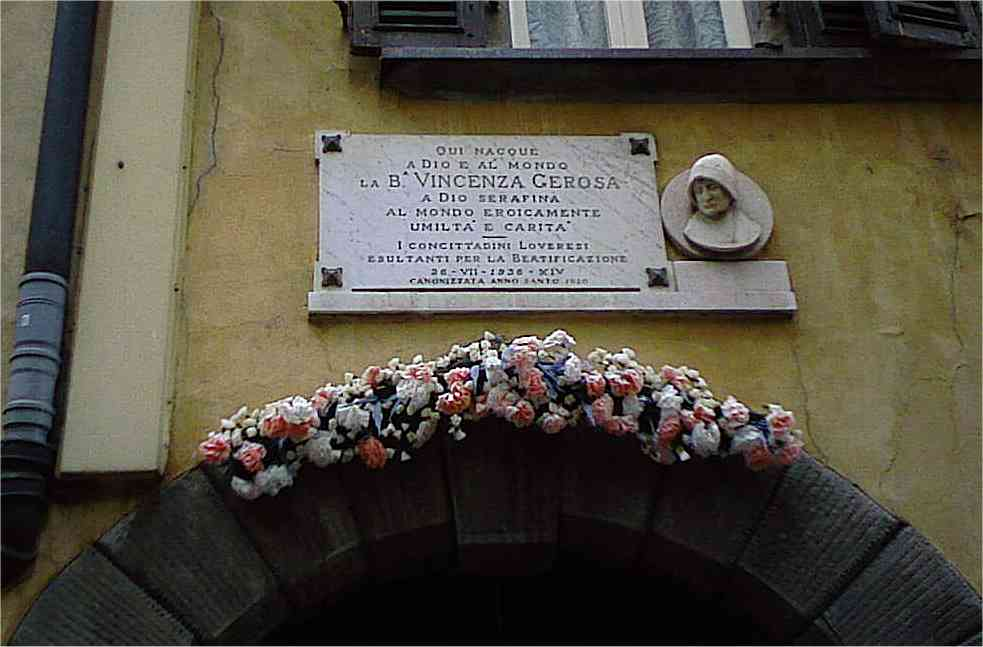 Lovere BG lapide sulla casa natale della santa Vincenza Gerosa (1784-1847) cofondatrice con la santa Bartolomea Capitanio (1807–1833) dell’Istituto delle Suore della Carità dette anche di Maria Bambina